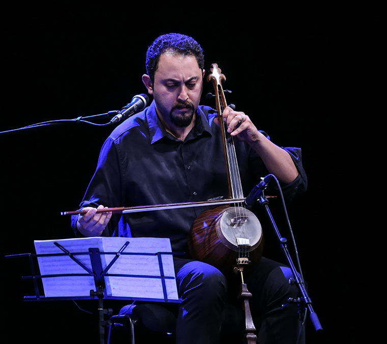 شروین مهاجر - کنسرت گروه مولوی به خوانندگی شهرام ناظری ۱۰ شهریور ۱۳۹۷ رویال هال هتل اسپیناس پالاس تهران